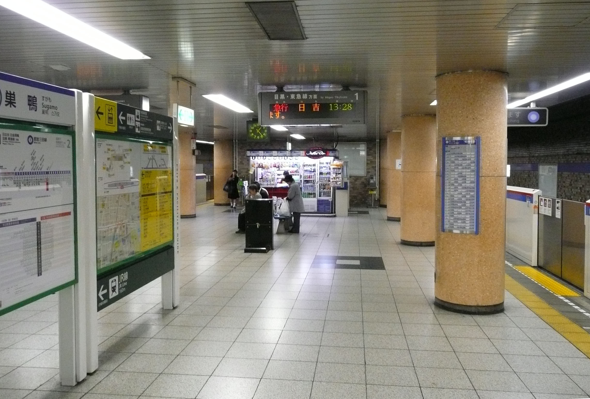 巣鴨駅都営地下鉄三田線ホーム